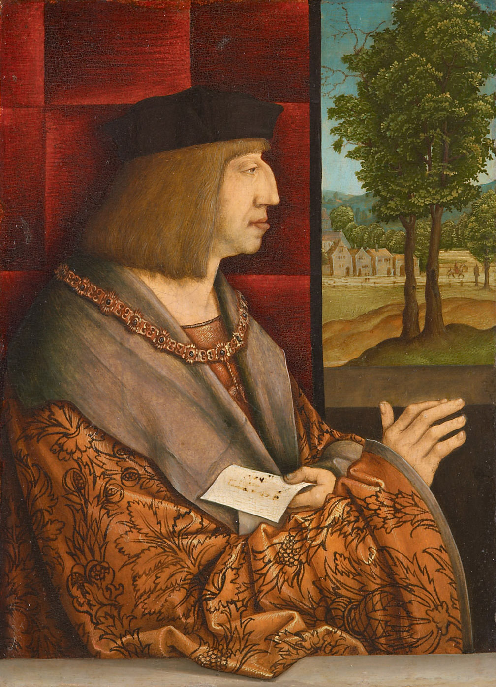 Kaiser Maximilian I. Sohn d. Friedrich III. von Habsburg